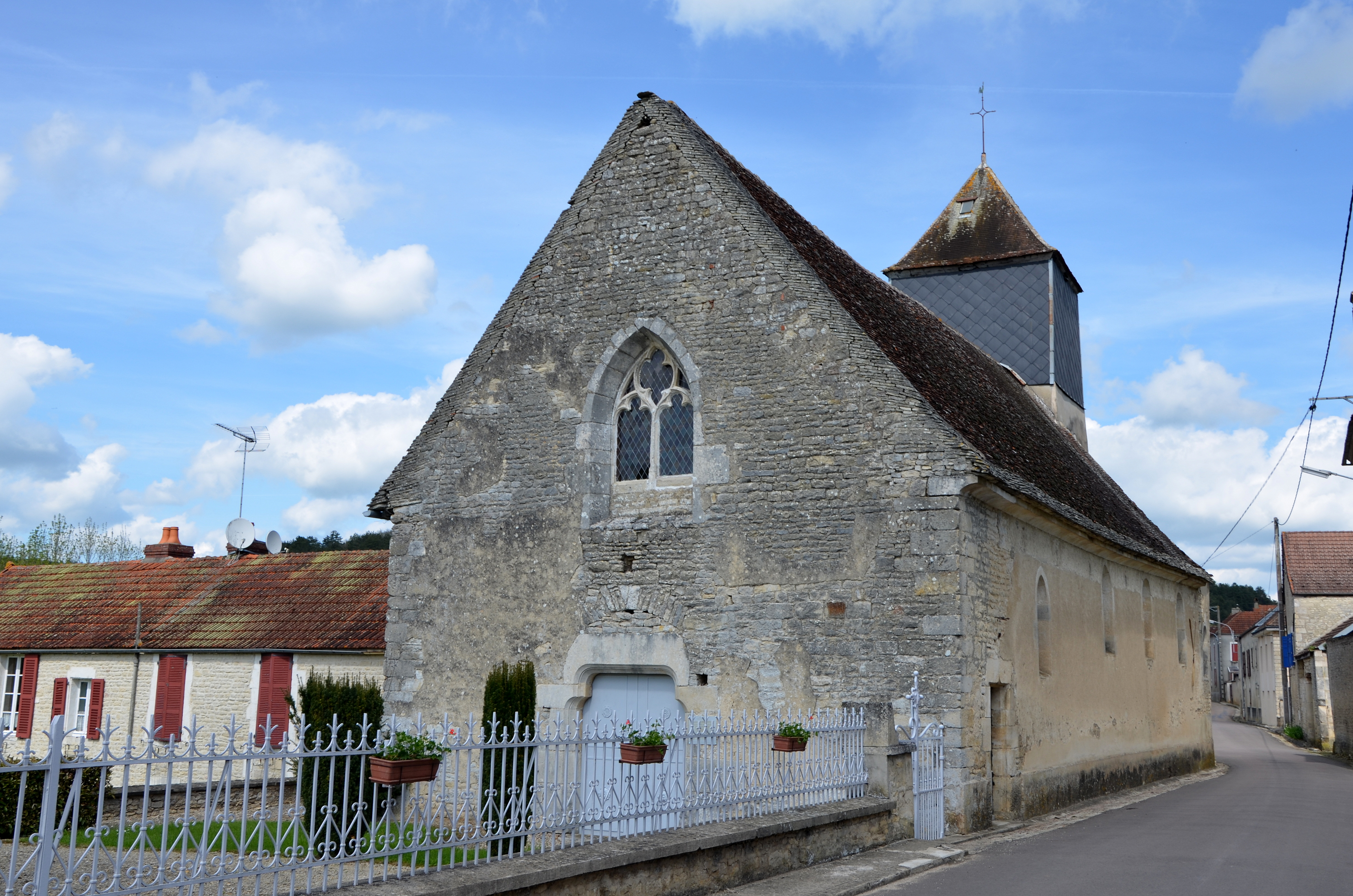 Eglise d'Ancy le Libre, Yonne, France